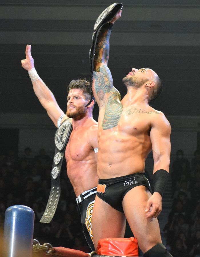 2016年2月11日 大阪府立体育会館 「THE NEW BEGINNING in OSAKA」 マット・サイダル（左）とリコシェ（右）